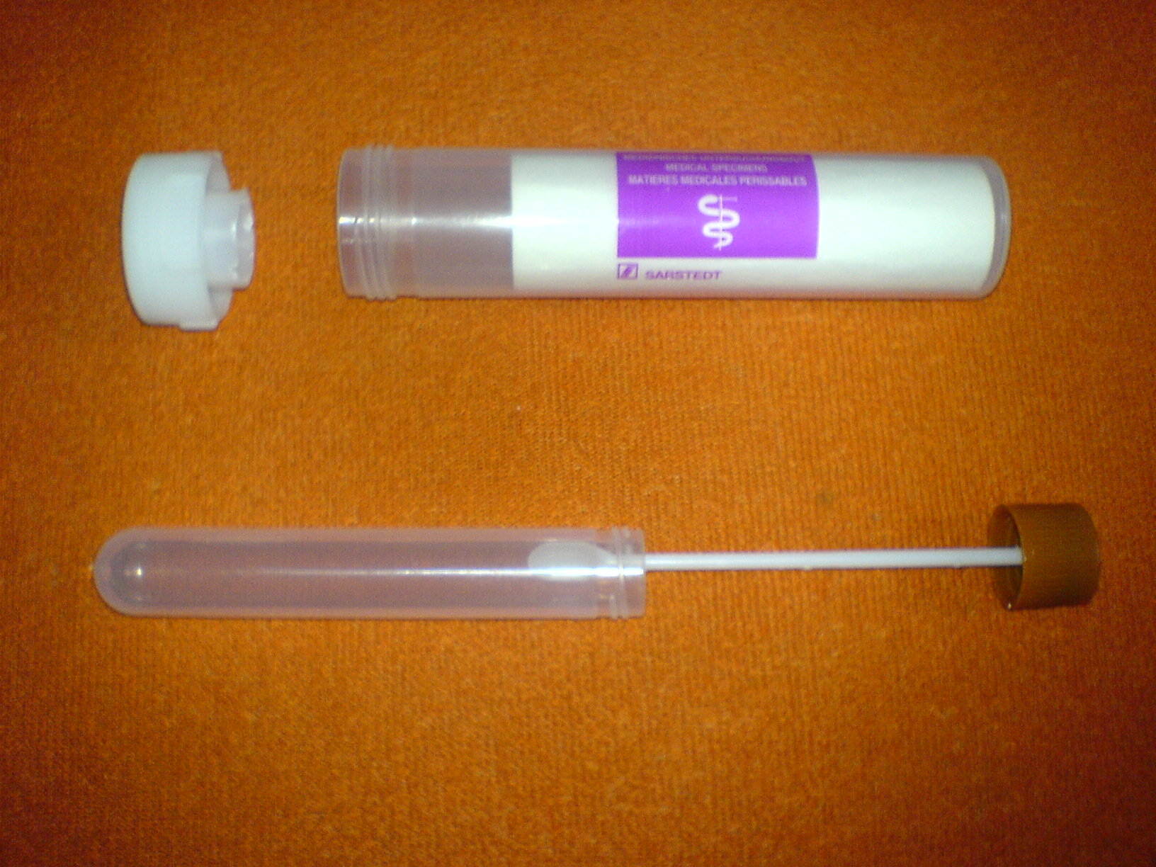 Einmal-Stuhlprobenröhrchen / Stuhlprobenschraubröhren / Stuhlröhren aus Polypropylen, 76 x 20 mm (außen) 75 x 23,5 mm (innen) mit integr. Spatel im Verschluß, auseinandergenommen, leer).